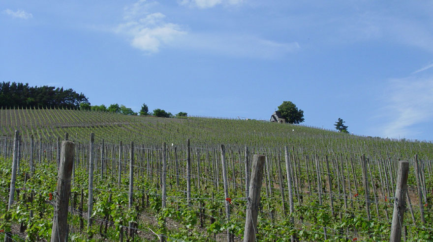 Weinberg in Rheinland-Pfalz